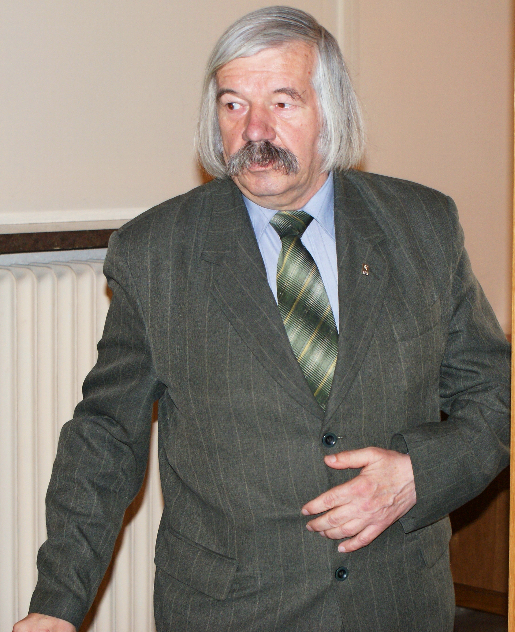 Anatol Sulik